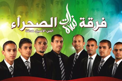 nssamat